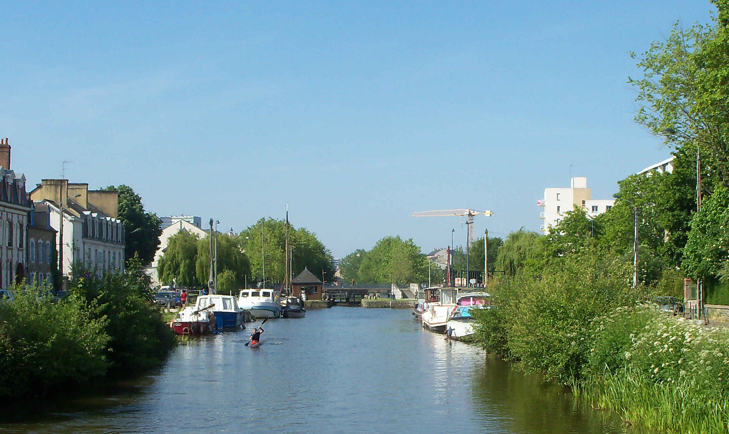 Canal d'Ille-et-Rance, écluse Saint-Martin en entrant dans Rennes, mai 2014.